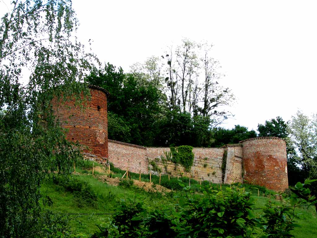 Châtillon-sur-Chalaronne, ruines de l'ancien château